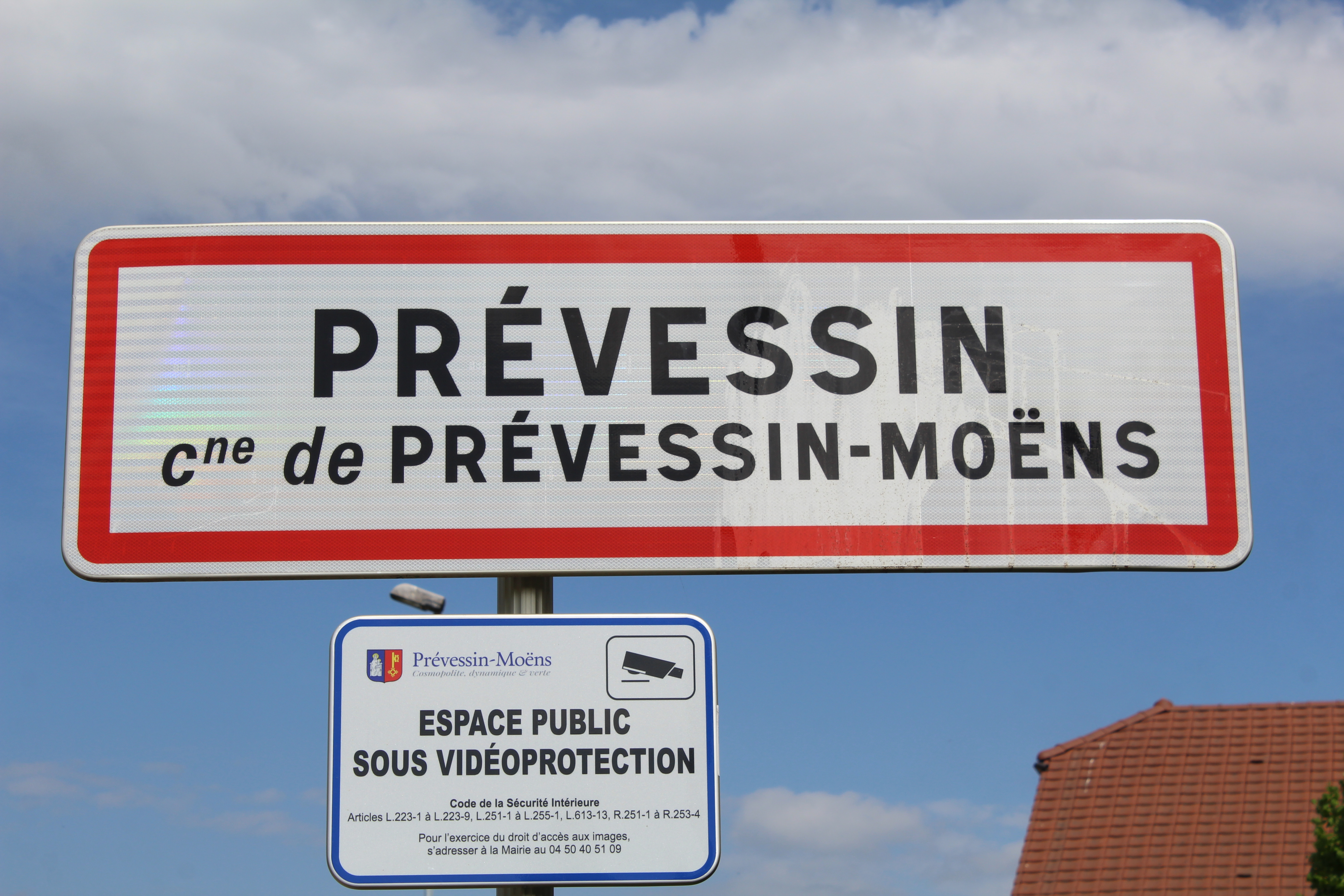 Panneau d'entrée dans Prévessin, Prévessin-Moëns.